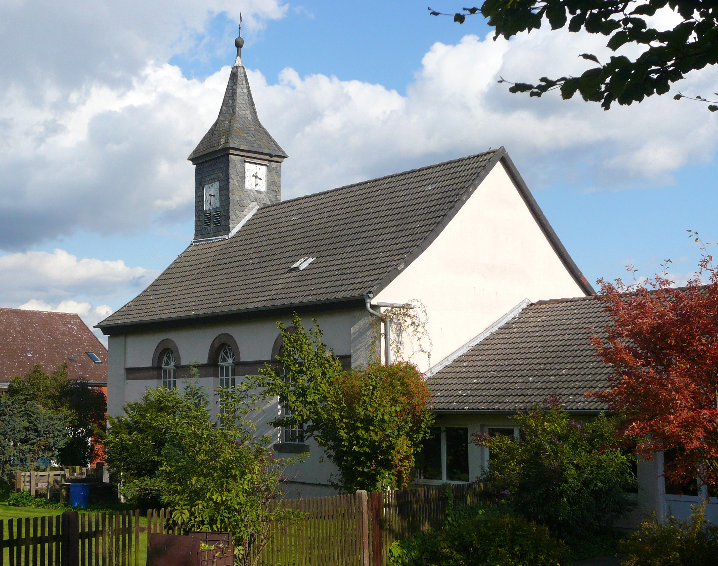 Evangelisch-reformierte Kirche in Reyershausen, Flecken Bovenden, Niedersachsen. Erbaut 1833 als spätklassizistischer Saalbau